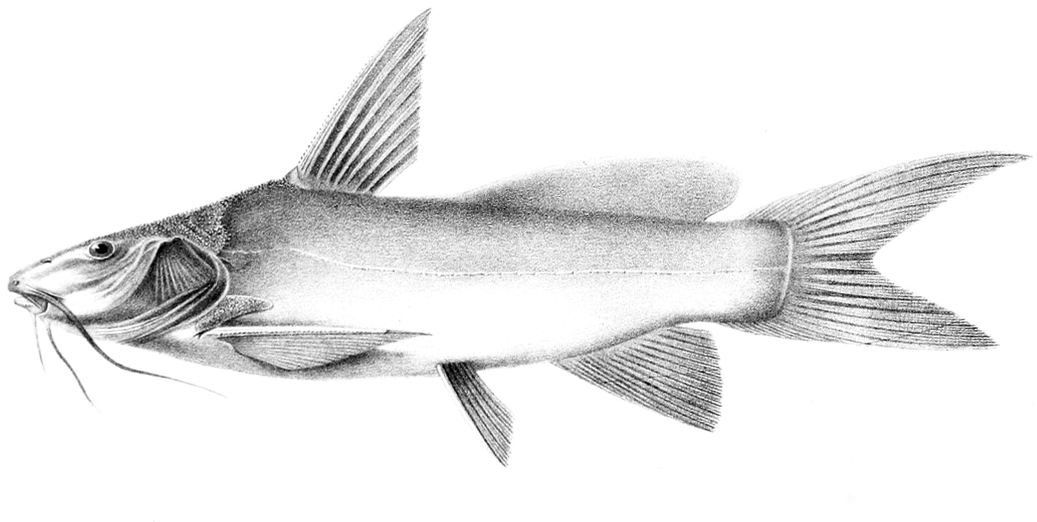 Ancharius fuscus